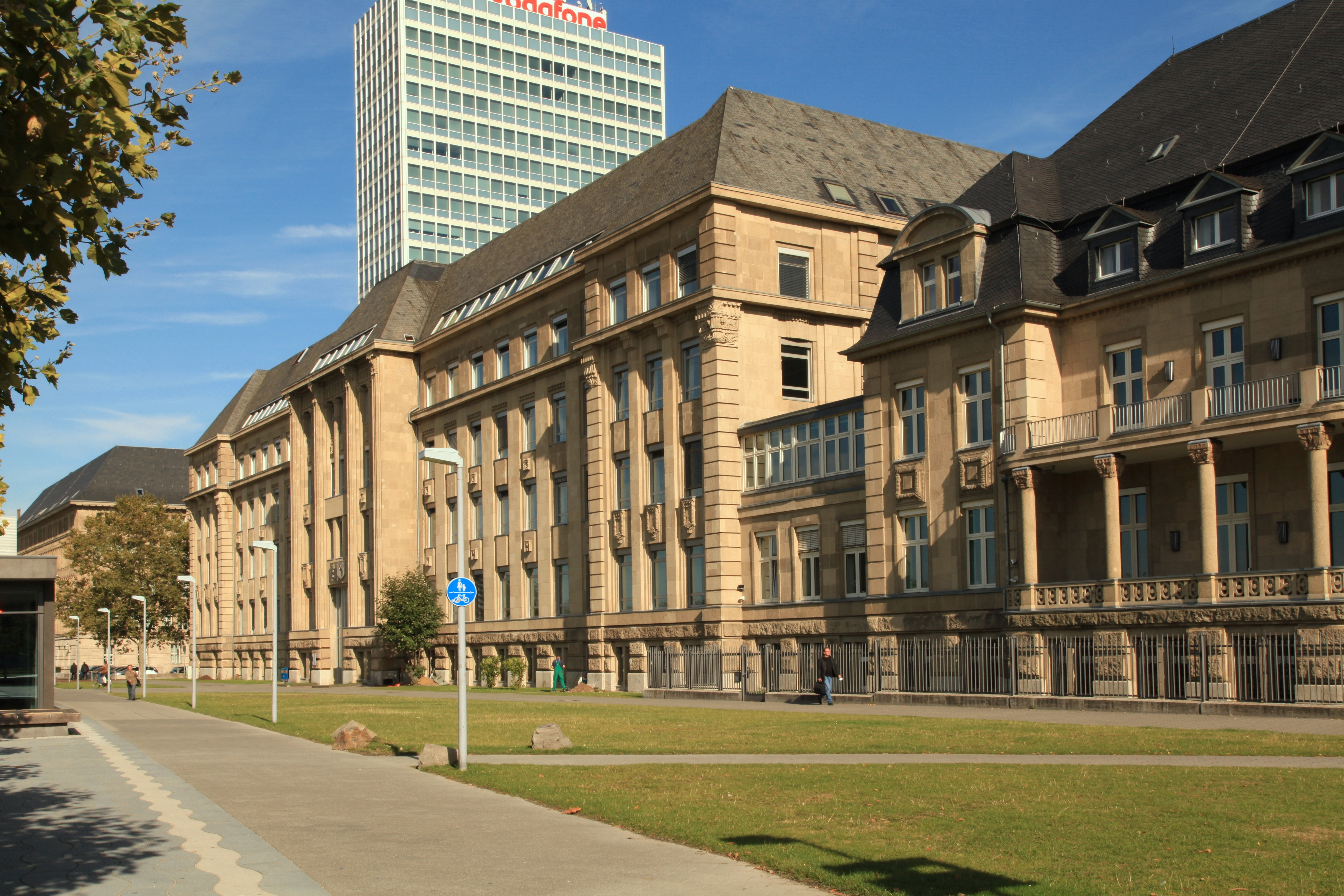 Landeshaus und Villa Horion am Mannesmannufer in Düsseldorf